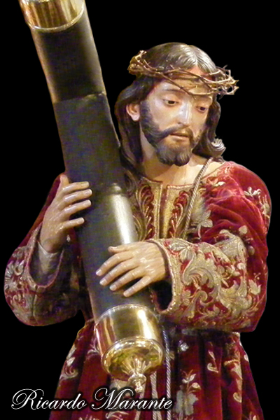 Imagen de El Nazareno de Santa Cruz de La Palma (1840). Obra de Fernando Estevez